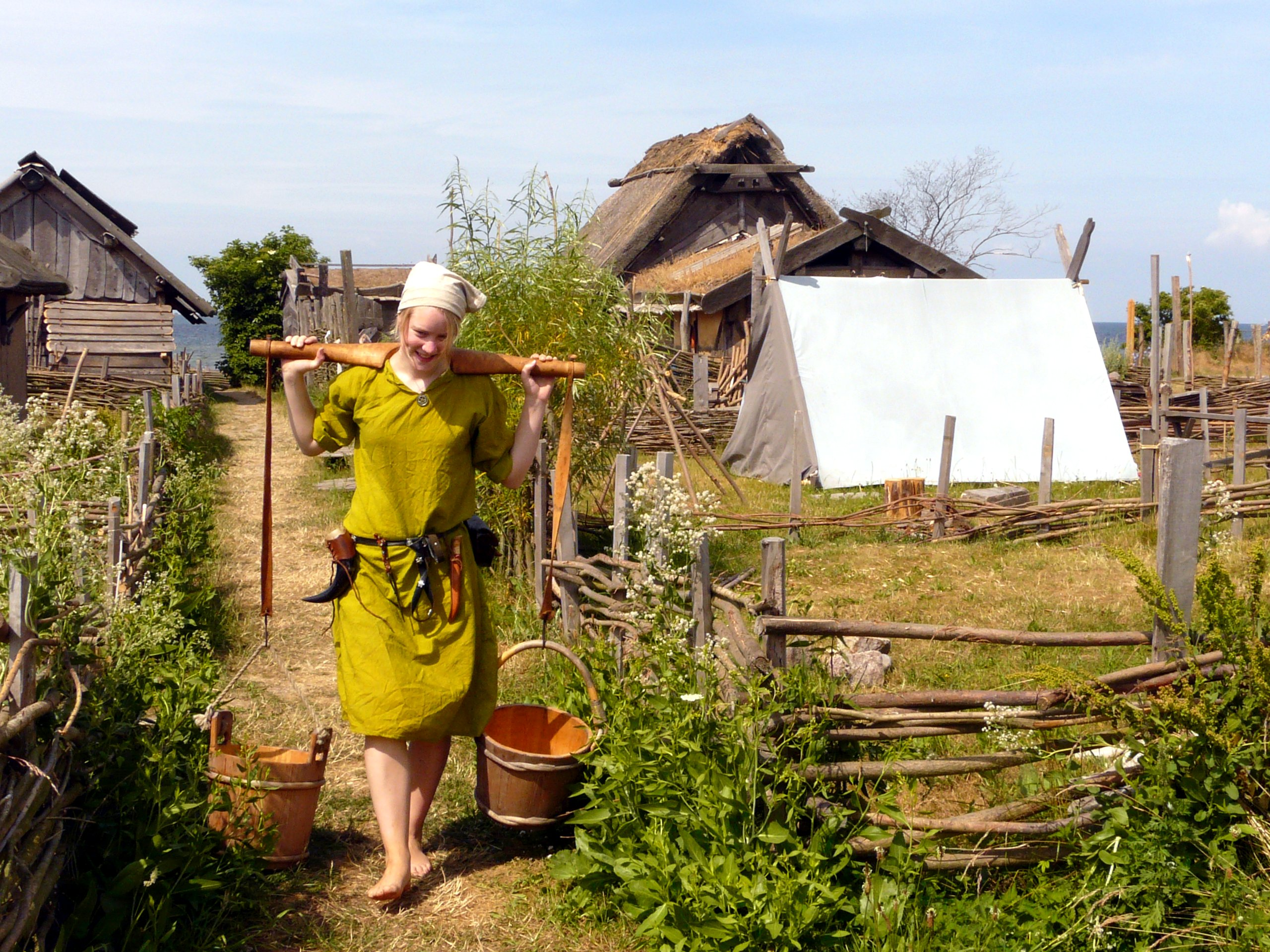 Wikingerzeitliche Living History in Fotevikens Museum, Schweden